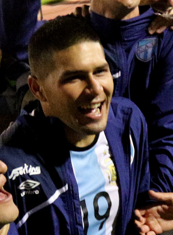 Quito, 7 Feb (Andes).- Encuentro por copa libertadores entre Nacional de Ecuador vs Atlético Tucumán de Argentina. Fotografías: Carlos Rodríguez/Andes.